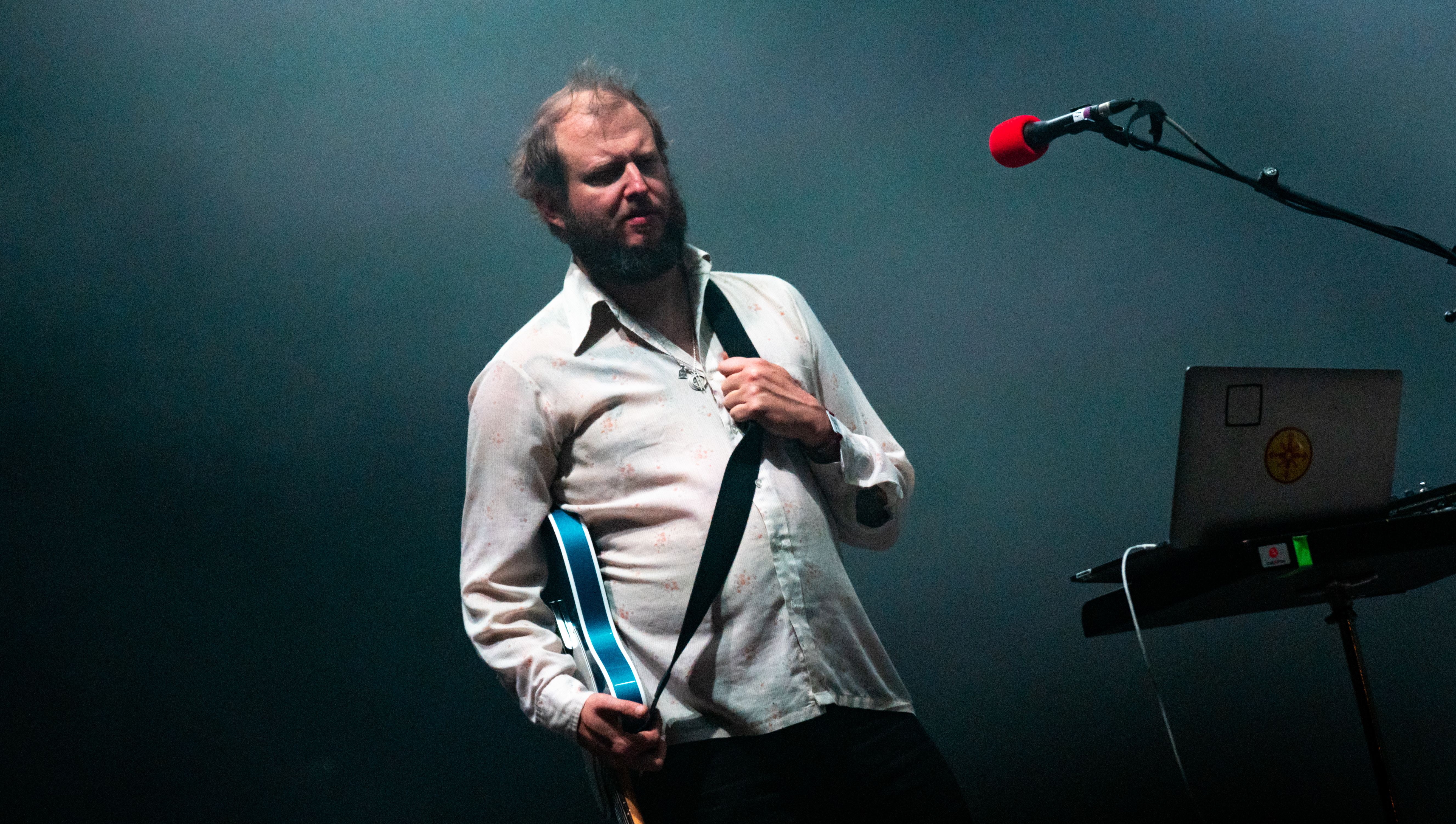 Primavera19_-6